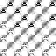 Игра Вертмана